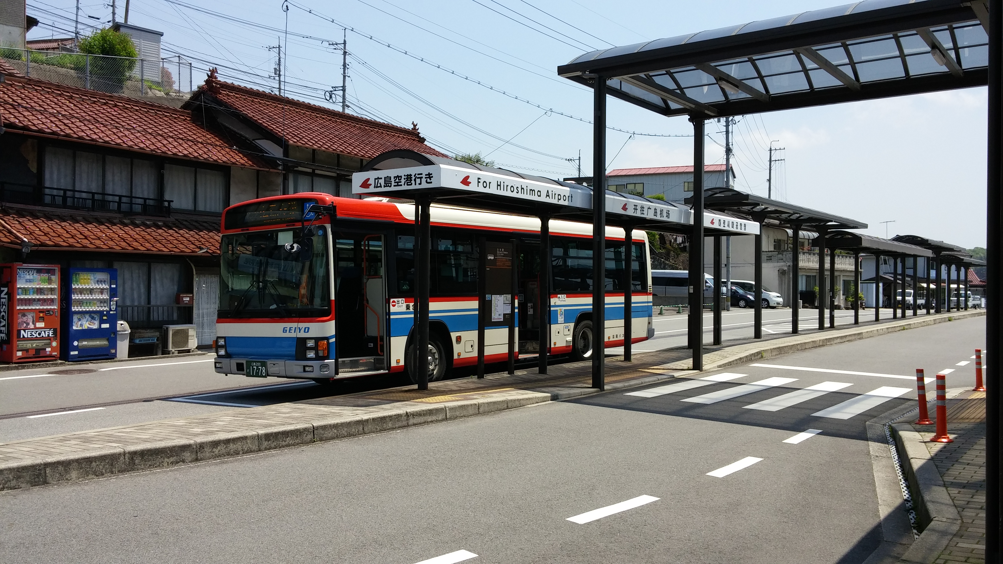 JR白市駅バス停（広島空港連絡バス）